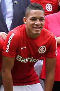 Visita da presidente Dilma Rousseff ao Beira-Rio (20 de fevereiro de 2014